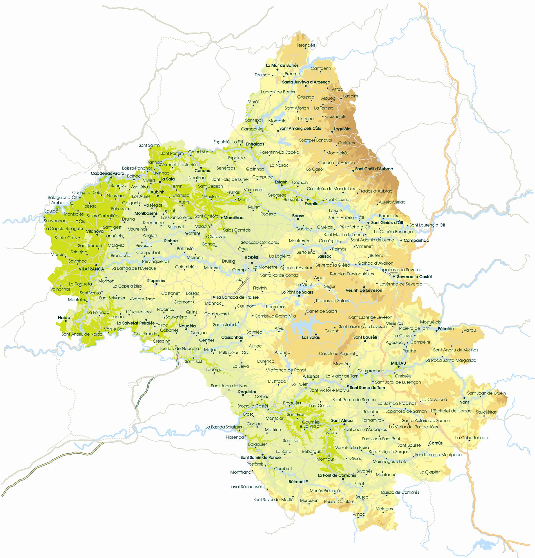 Mapa d'Avairon